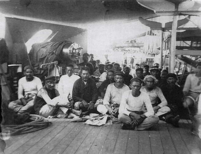 "Rebelles" de Raiatea prisonniers ramenés à Tahiti sur l'aviso Aube ou le croiseur Duguay-Trouin